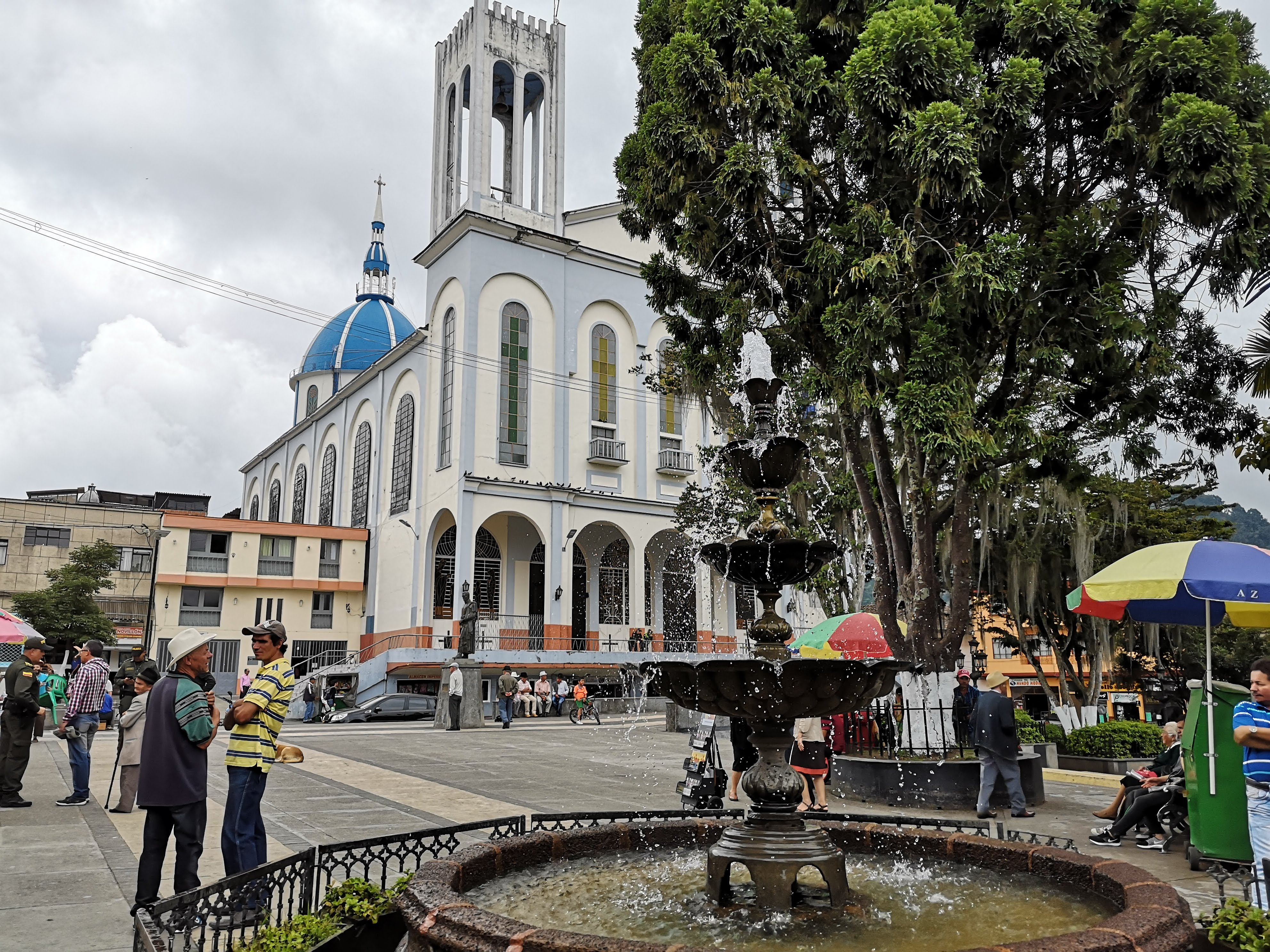 Iglesia de Nuestra Señora del Rosario, Aranzazu